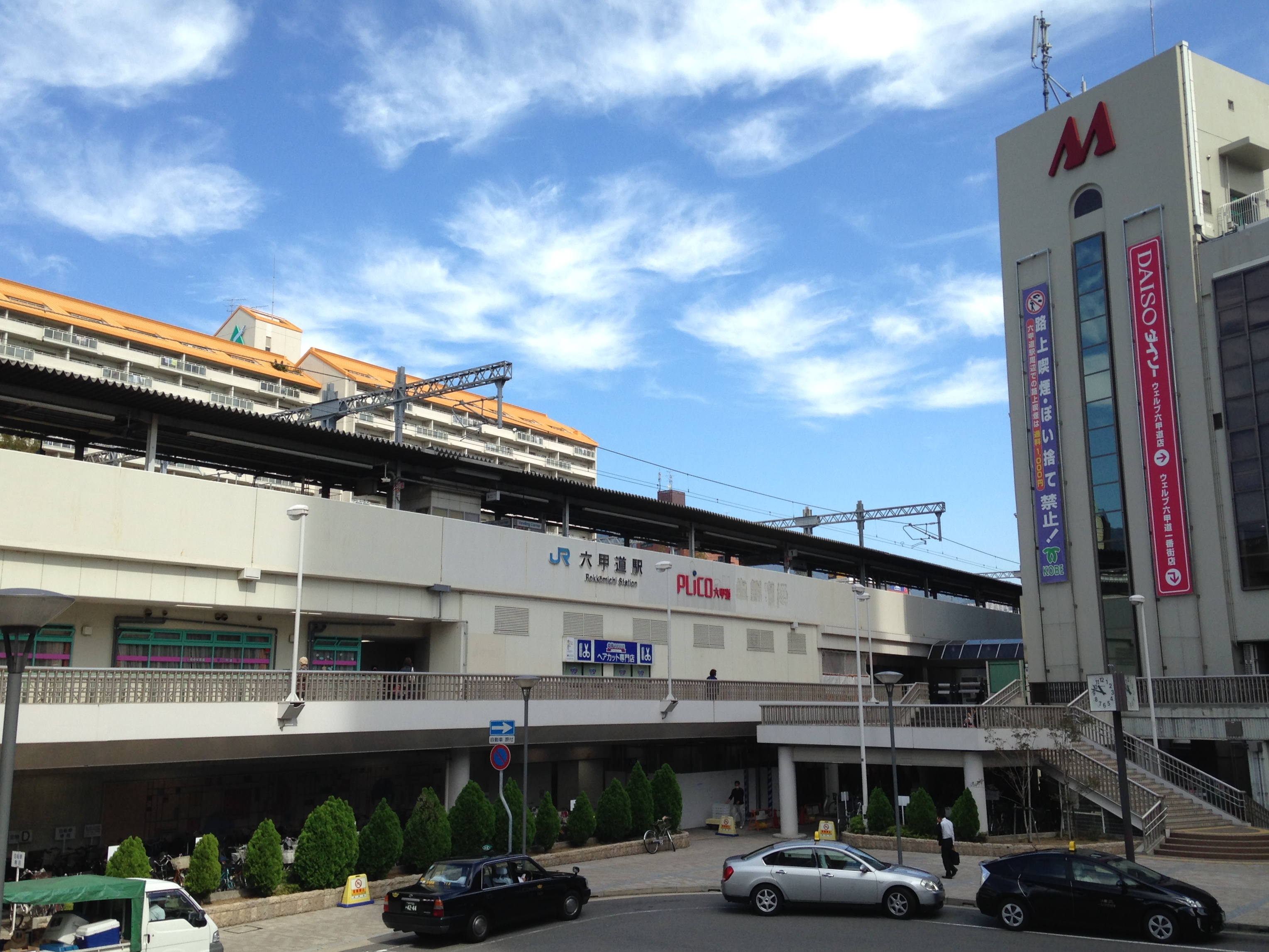 六甲道駅・南口